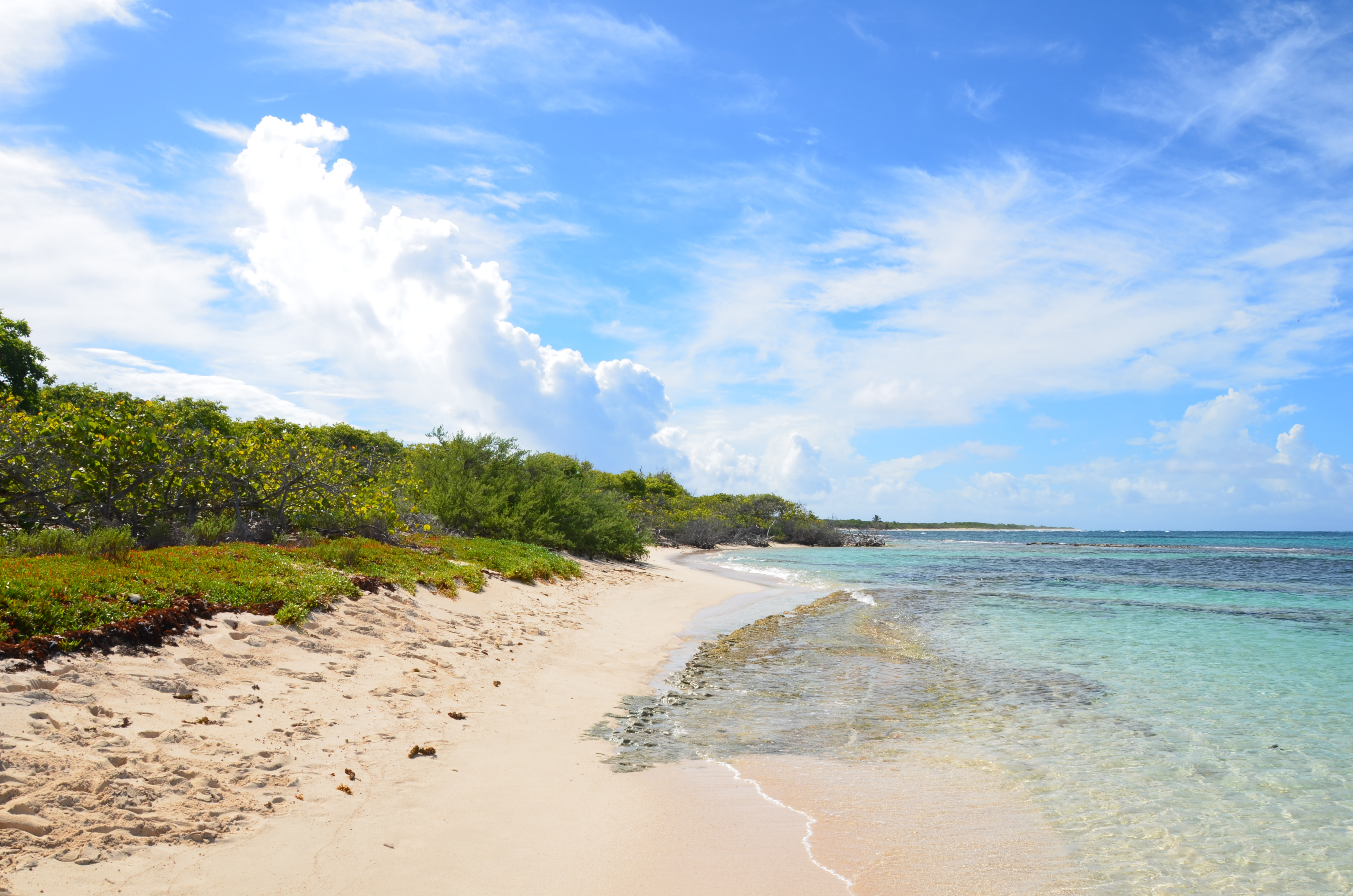 Iles de la Petite-Terre